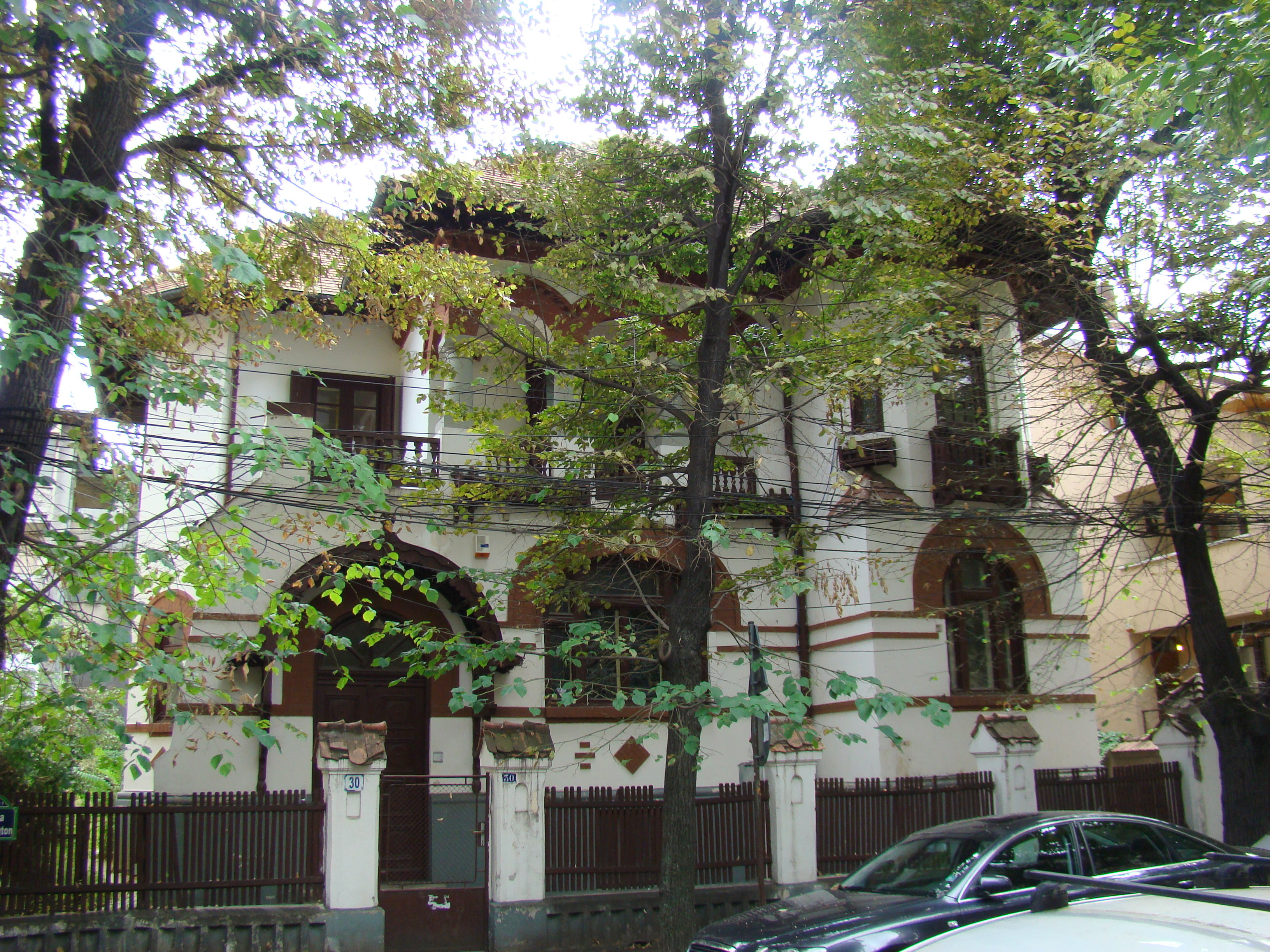 Casă monument istoric, str. Washington, nr.30